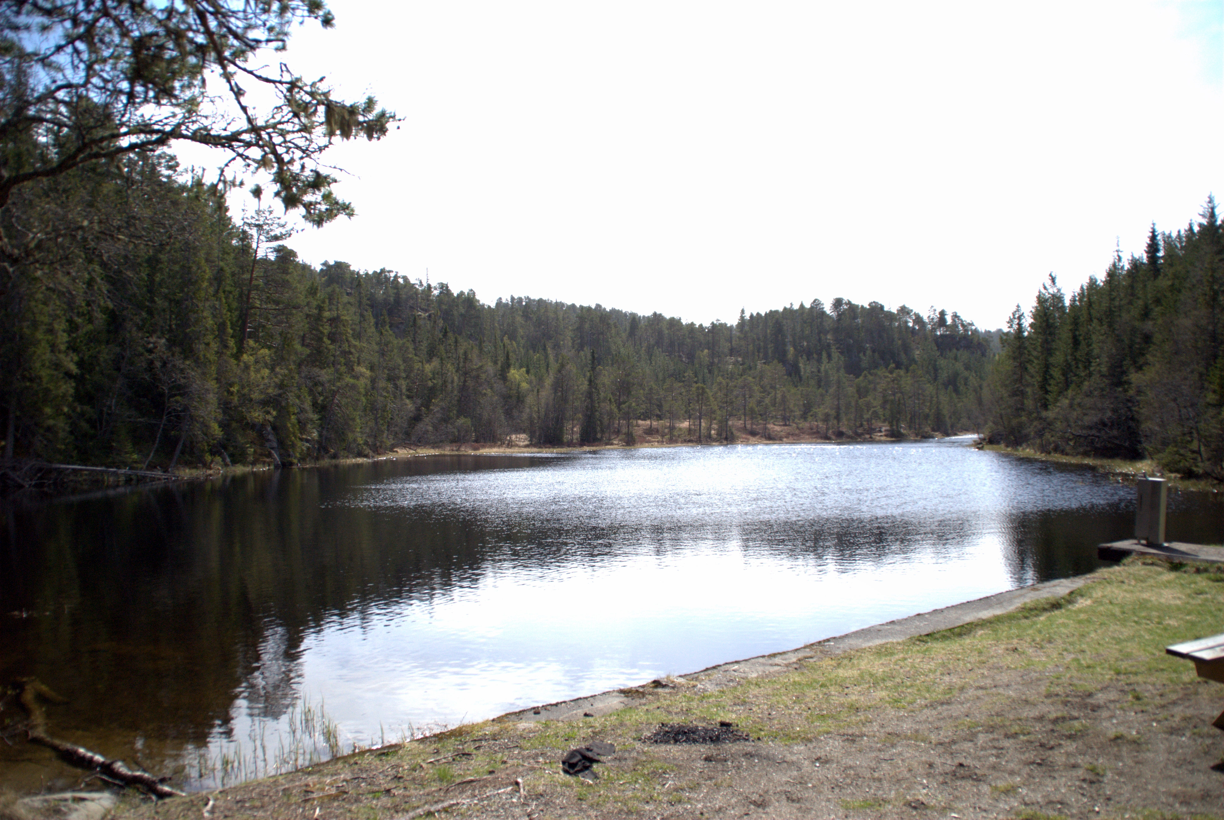 Nydammen, også kalt Langdammen, i Bymarka i Trondheim.